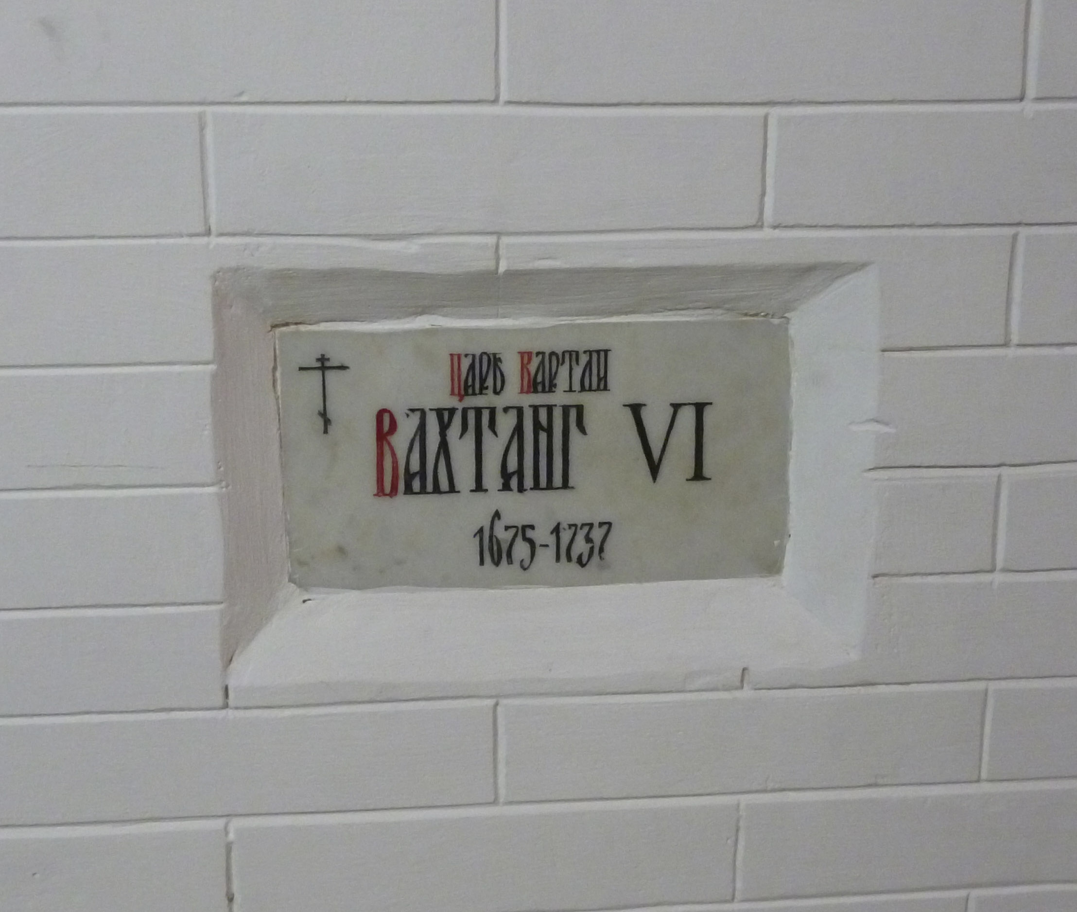 Захоронение грузинского царя Вахтанга VI в подклете Успенского собора Астрахани. После возвращения собора Русской православной церкви останки царя были перезахоронены у западной стены подклета собора.